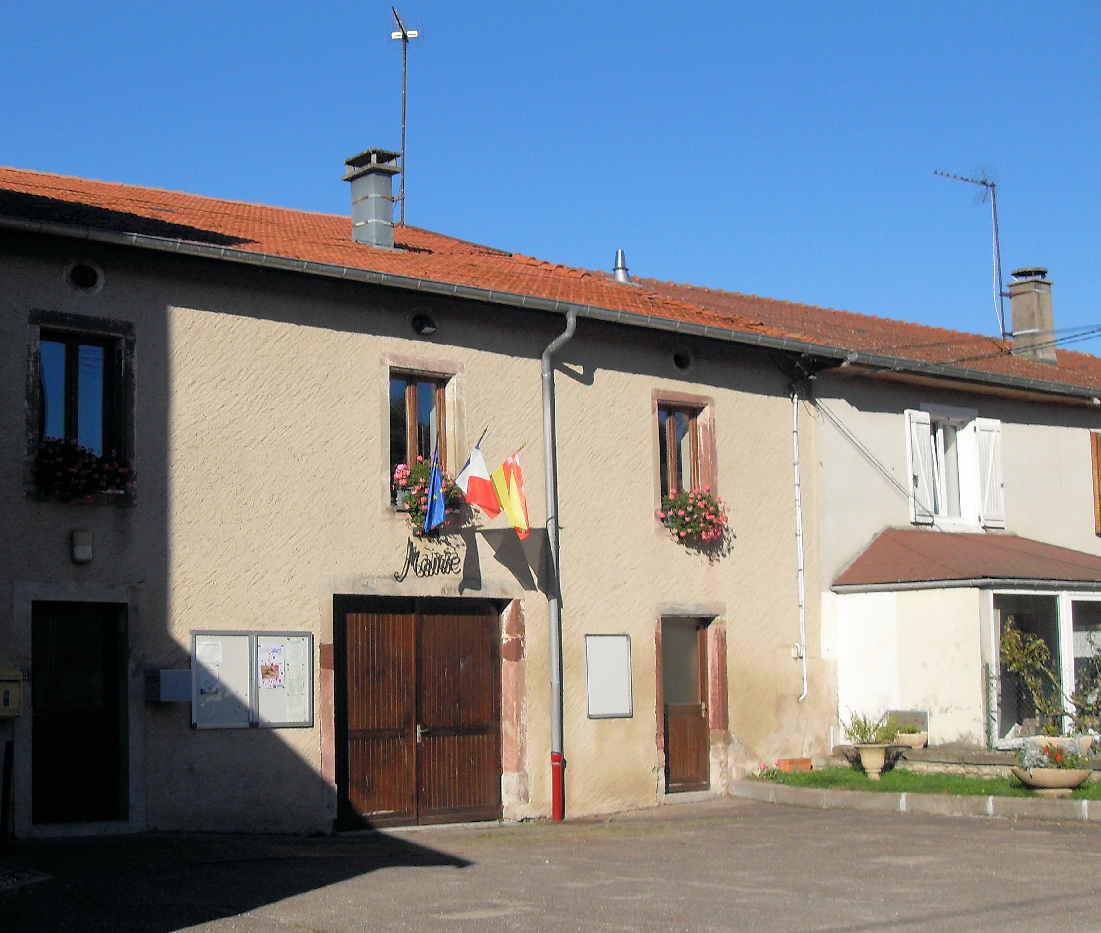 La mairie de Rozerotte